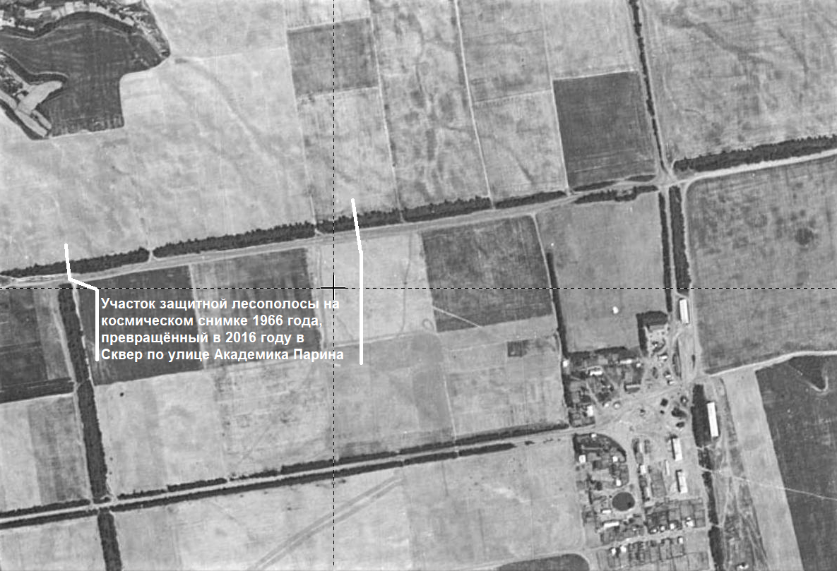 Участок защитной лесополосы на космическом снимке 1966 года, превращённый в 2016 году в сквер по улице Академика Парина (Казань)